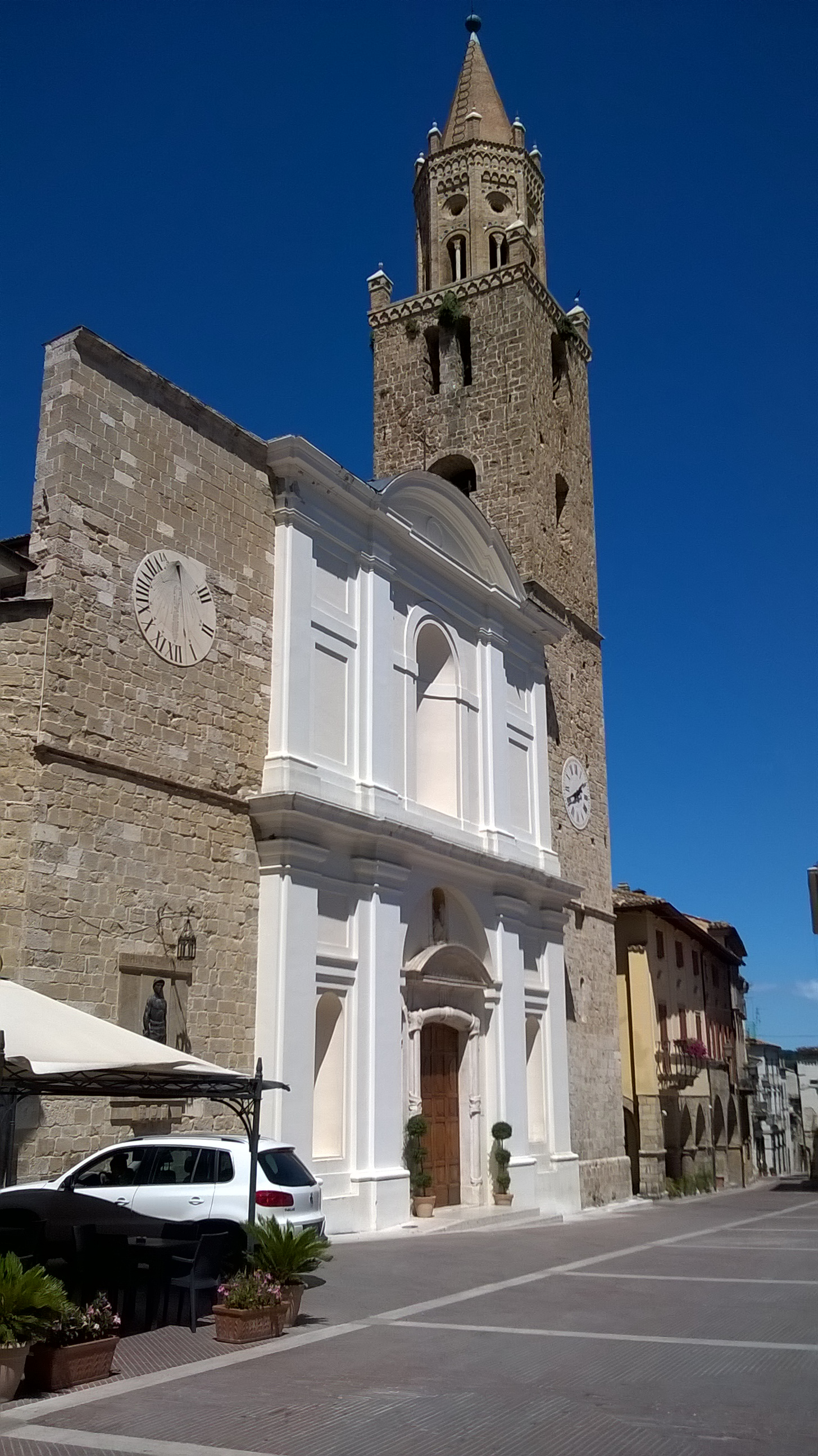 Duomo di Beata Vergine Maria in Platea in Campli